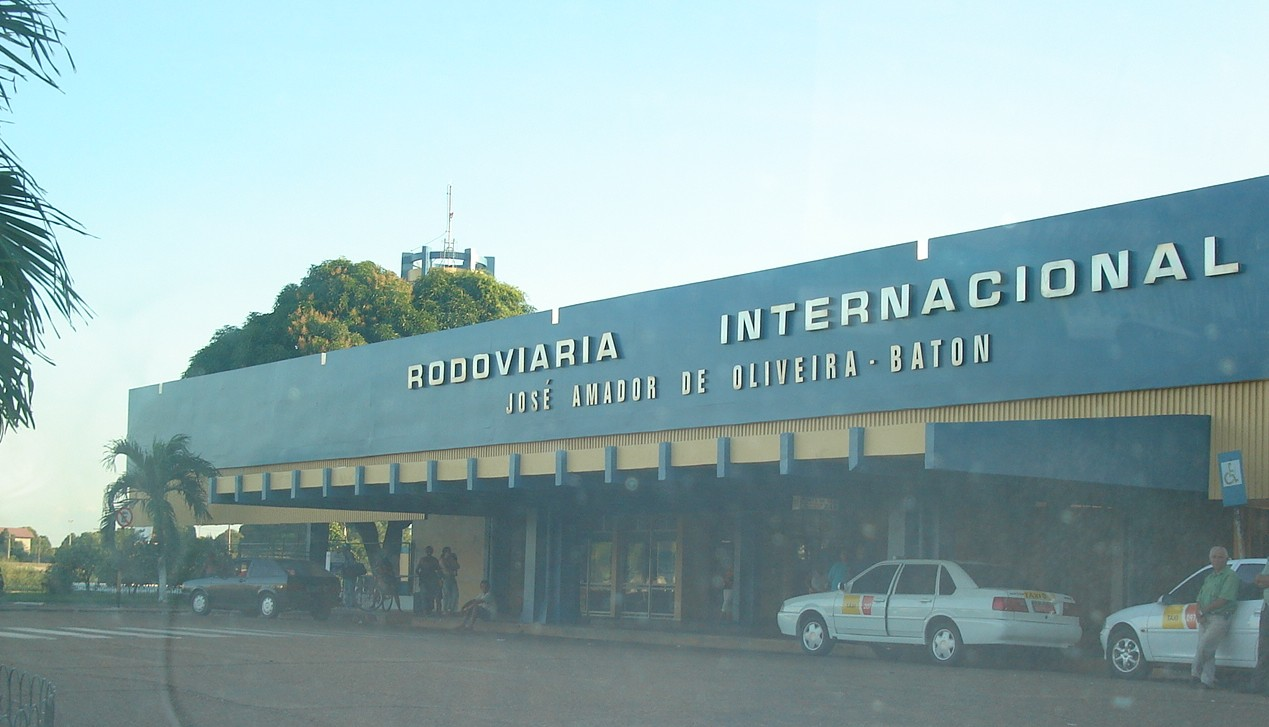 Rodoviário internacional de Boa Vista